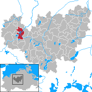 Bützow in Mecklenburg-Vorpommern - District Güstrow